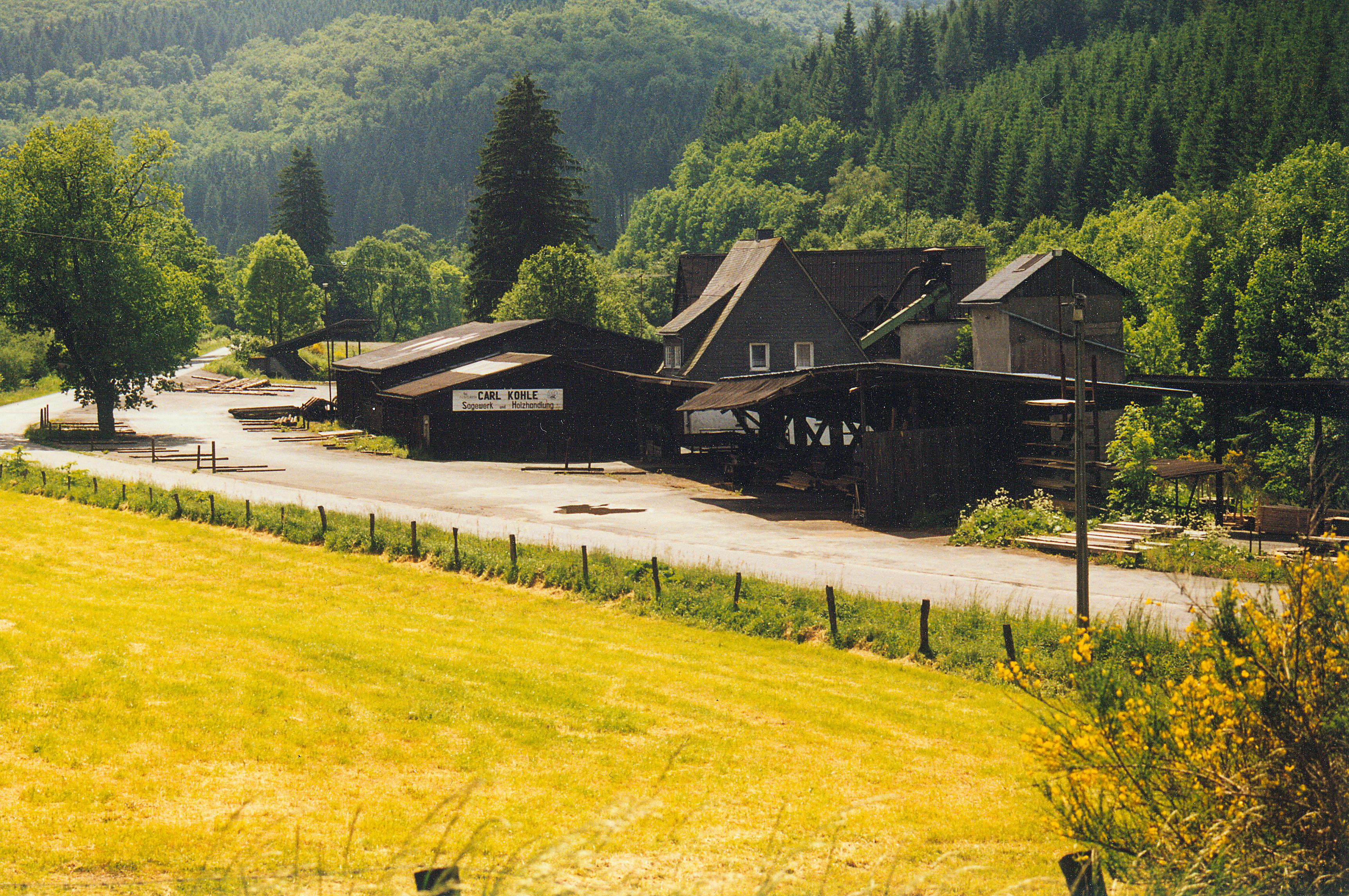 Schmallenberg-Waidmannsruh, Sägewerk Carl Kohle 2003 (Germany)